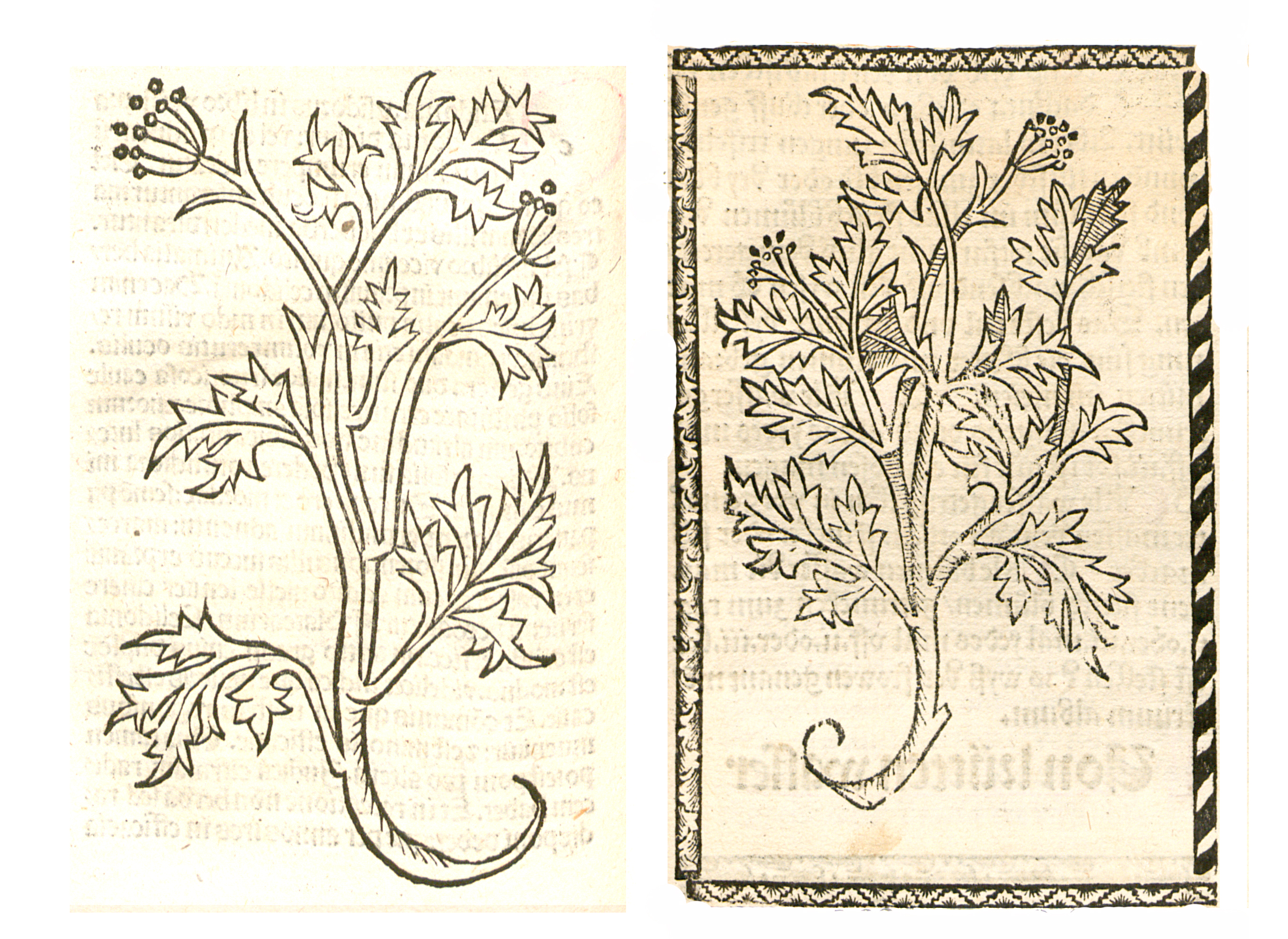 Abbildung von Körbel Krut (Anthriscus cerefolium)